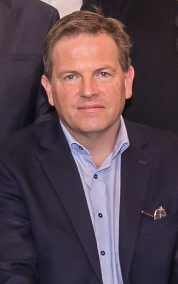 Team der ARD. Gerd Gottlob, Kommentator.